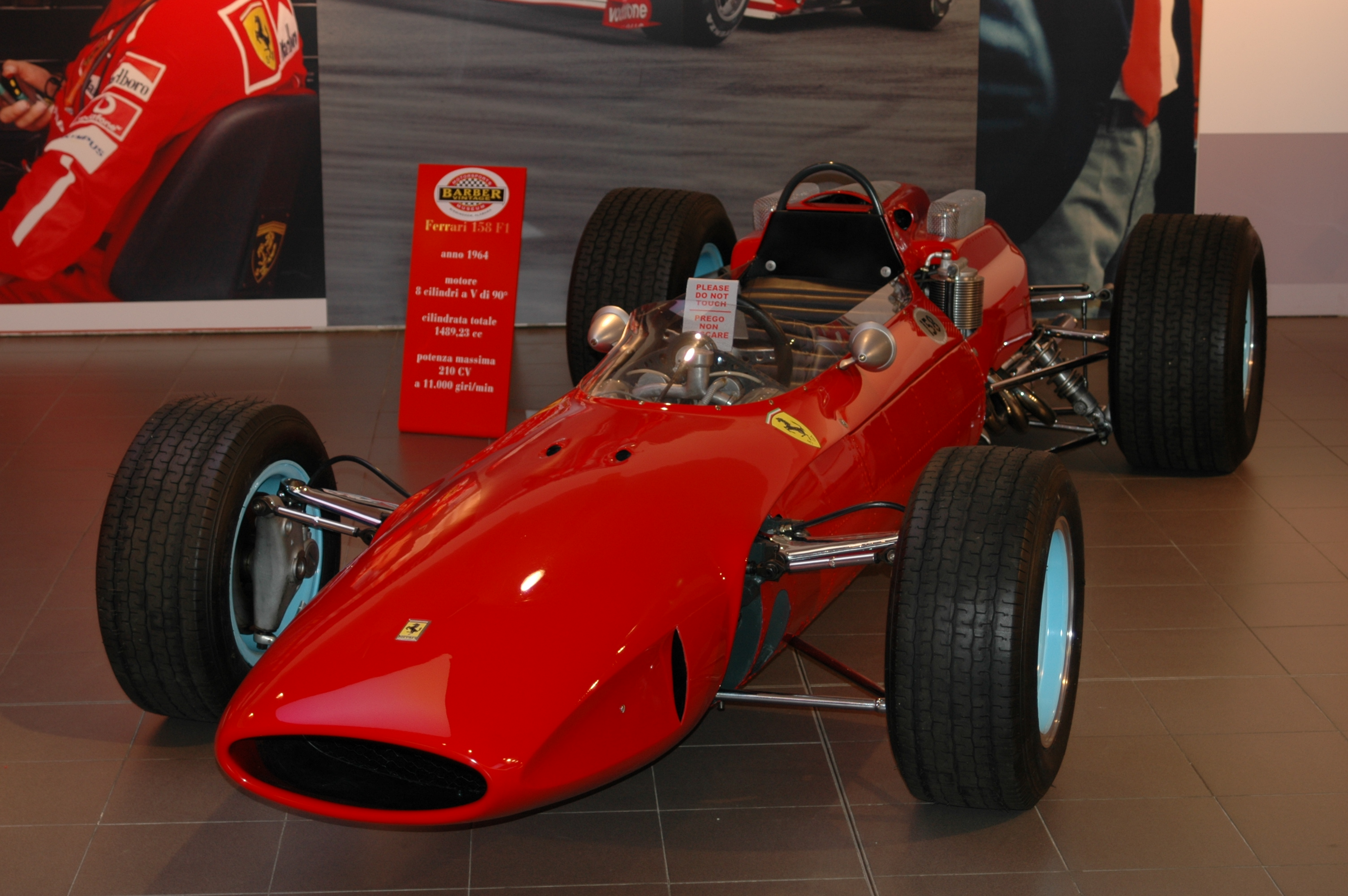 Ferrari 158 F1 racing car